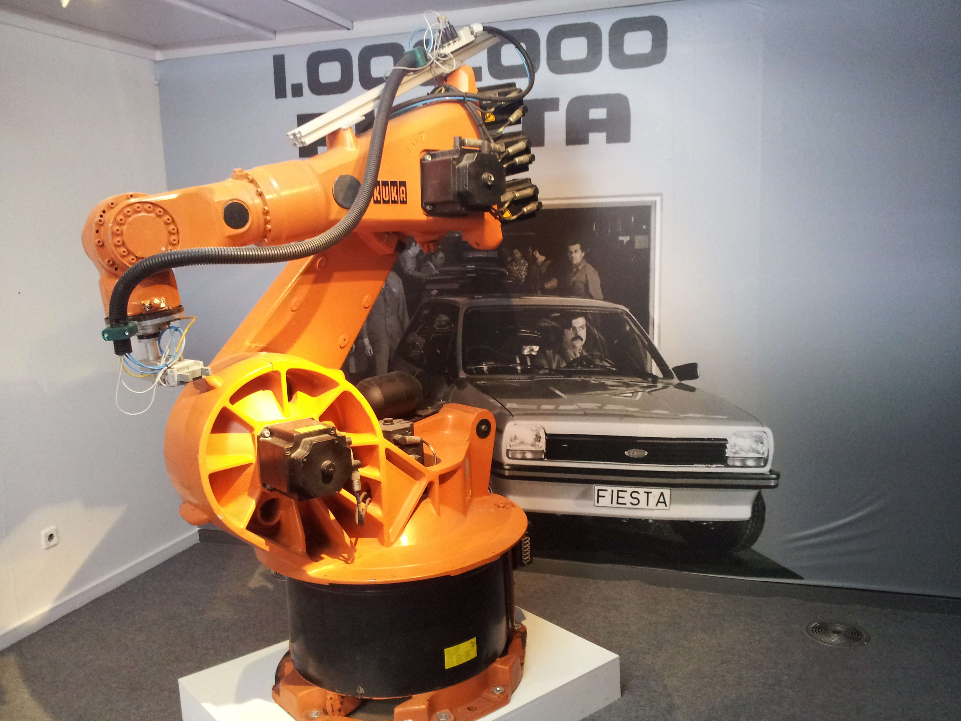 Maquinària de construcció d'automòbils.